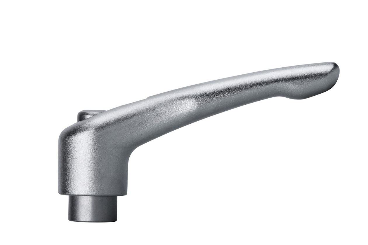 Klemmhebel (Hersteller: Heinrich Kipp Werk) - Klemmhebel bestehen aus einem Griffhebel, in den ein Einsatz mit Innengewinde oder Außengewinde eingebracht ist.